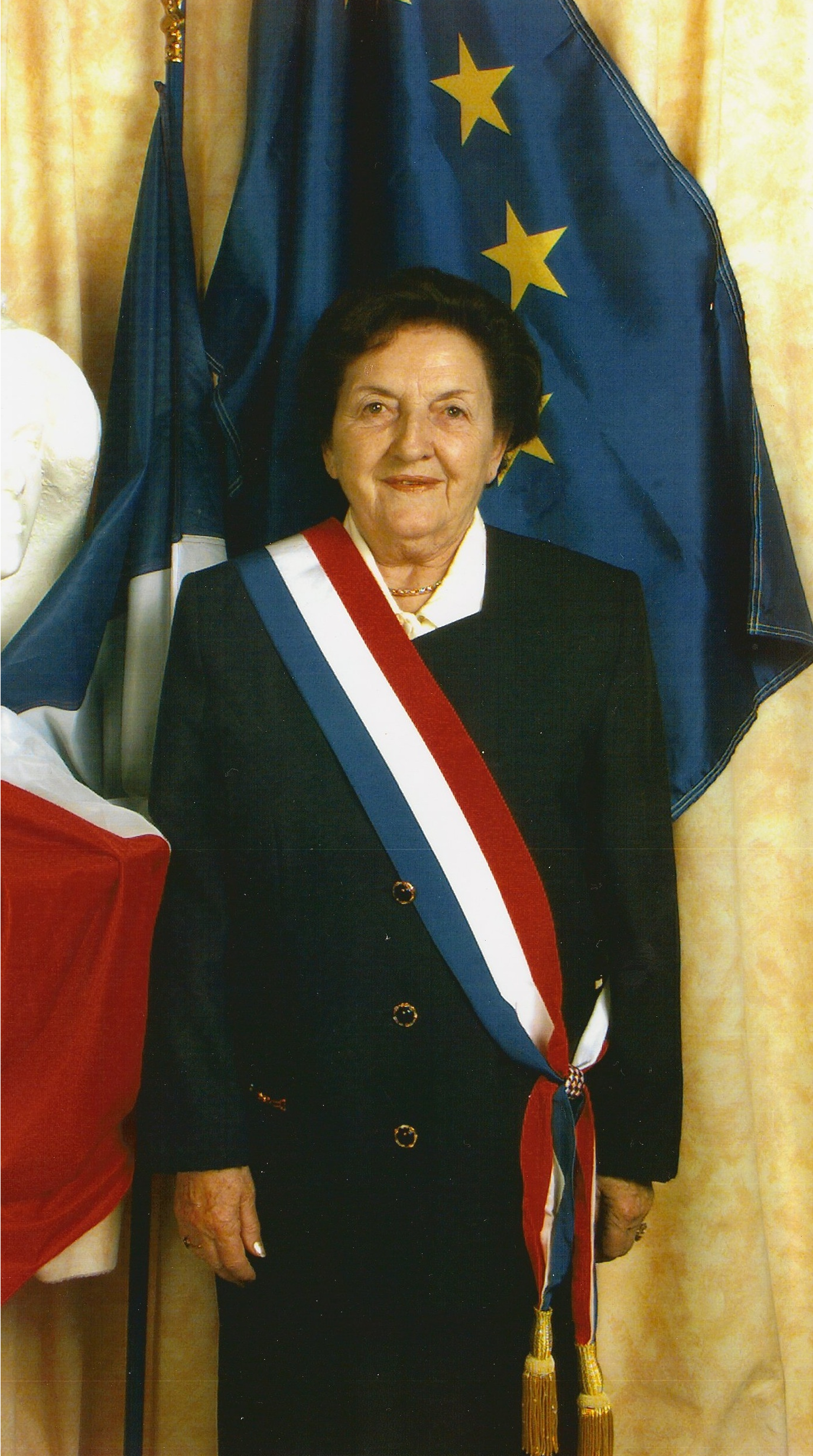 Portrait de Ginette Valley, maire de Champey